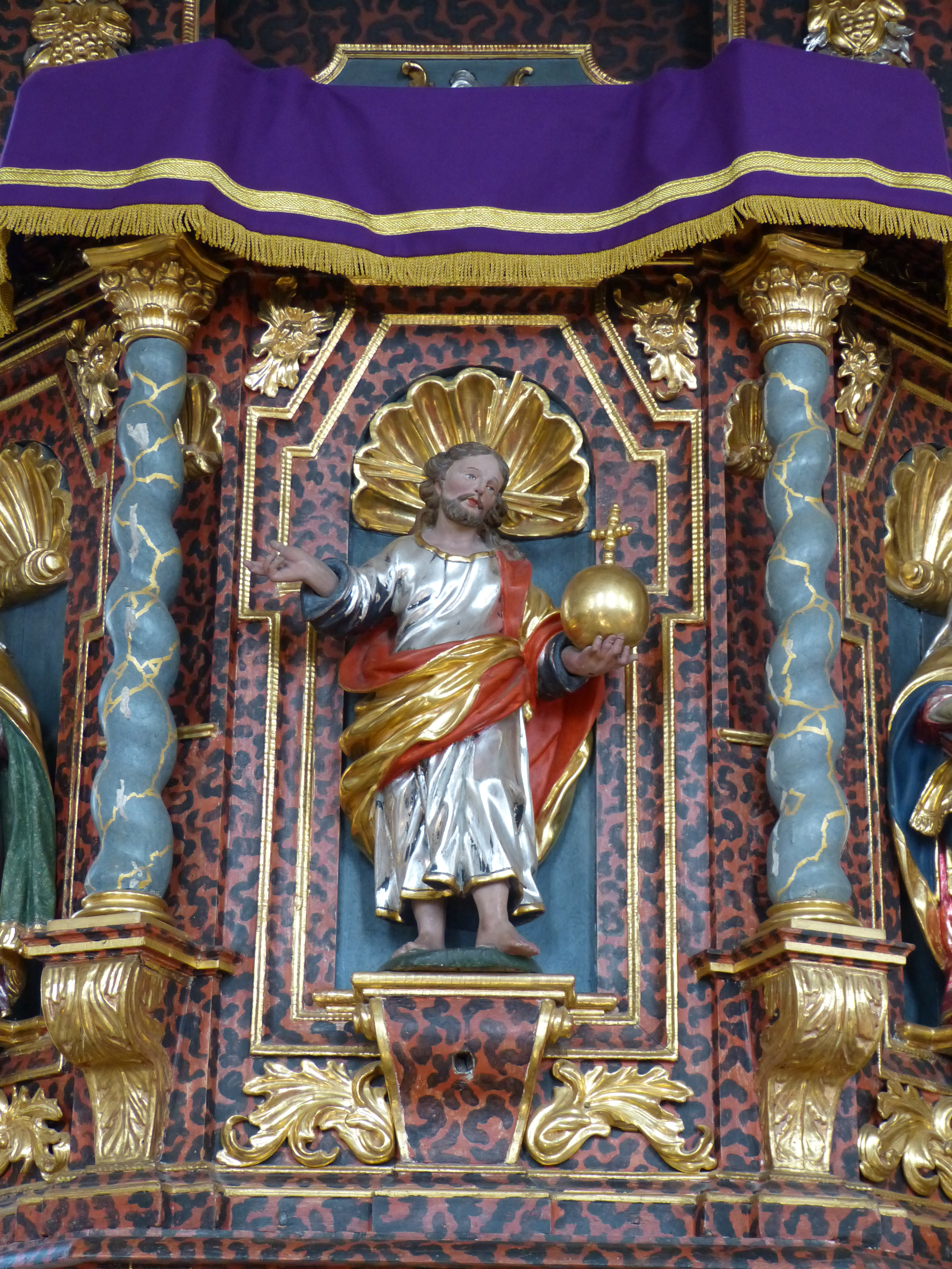 St. Georg, Niederrieden, Landkreis Unterallgäu, Bayern